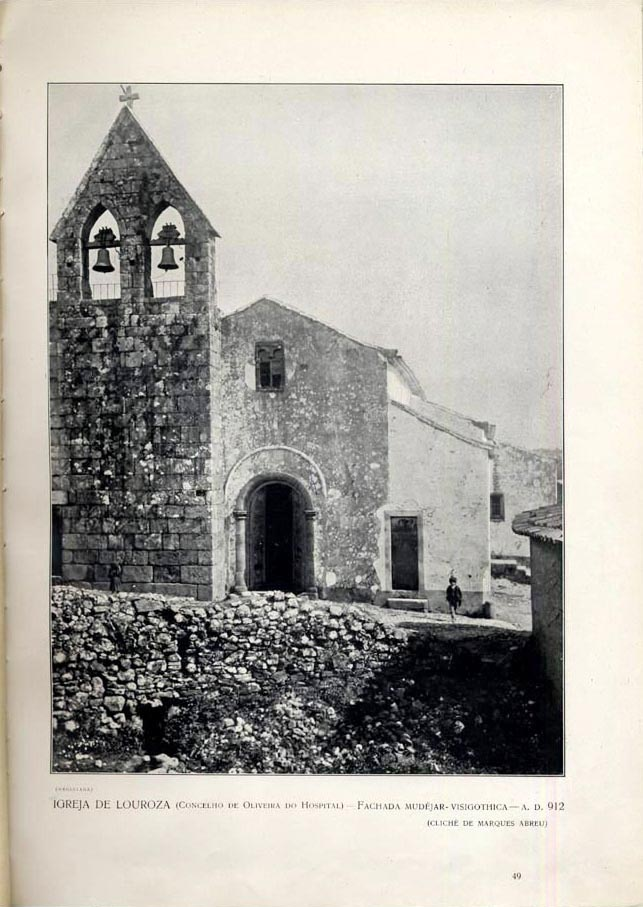 Fig. 7 - Foto de 1926 vendo-se o campanário adossado à igreja (arquivo familiar da autora)